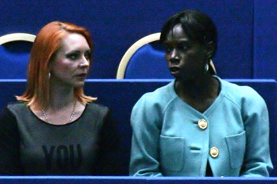 Марина Анисина и Сурия Бонали, в качестве почетных гостей, на трибунах чемпионата мира по фигурному катанию 2012